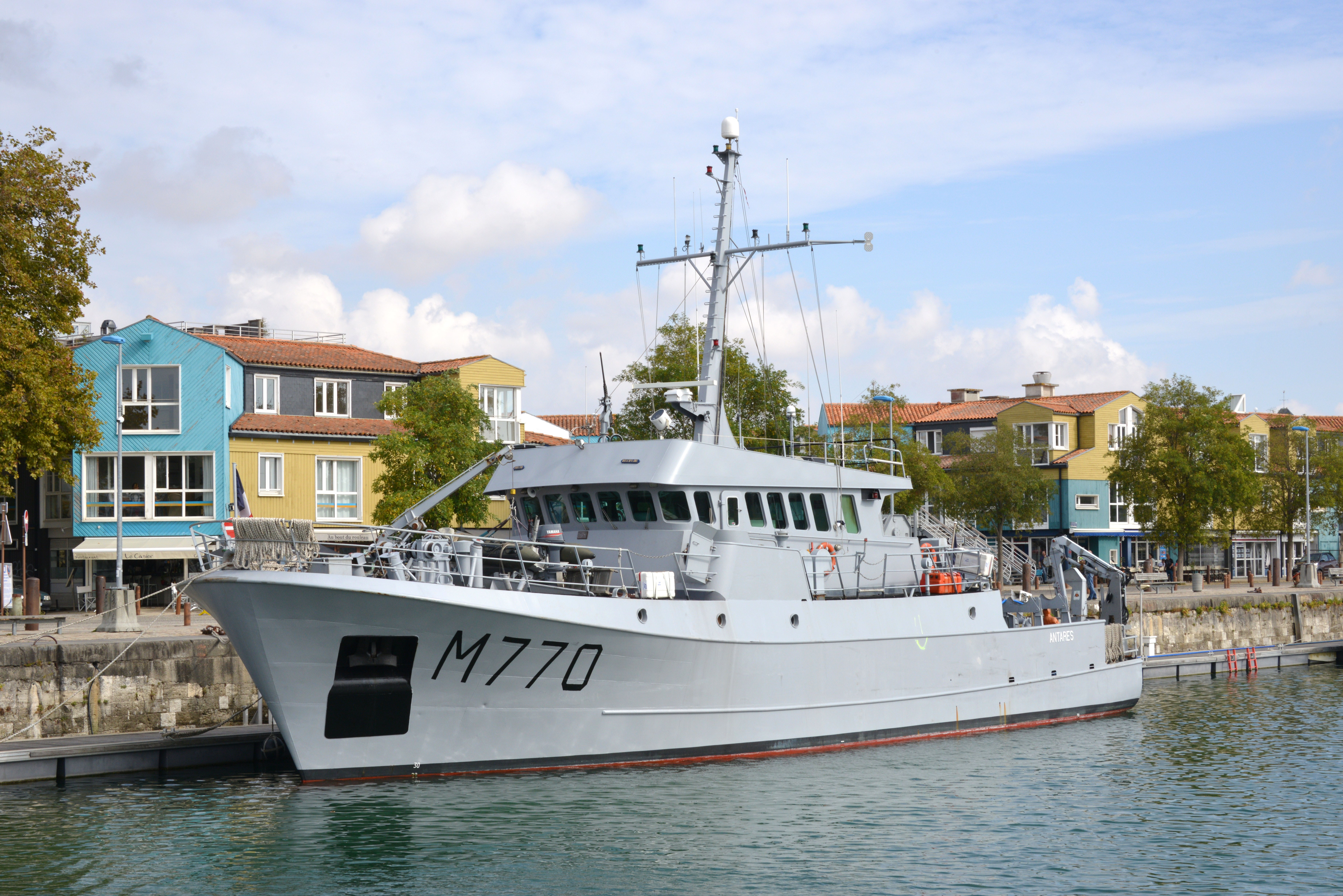 Le bâtiment (navire) remorqueur de sonars « Antarès » de la Marine Nationale Française en escale dans le Bassin des Chalutiers du port de La Rochelle. Ce navire, remorqueur de sonars (BRS), a été lancé en 1993. Immatriculation : M 770. La Rochelle, Charente-Maritime, France.